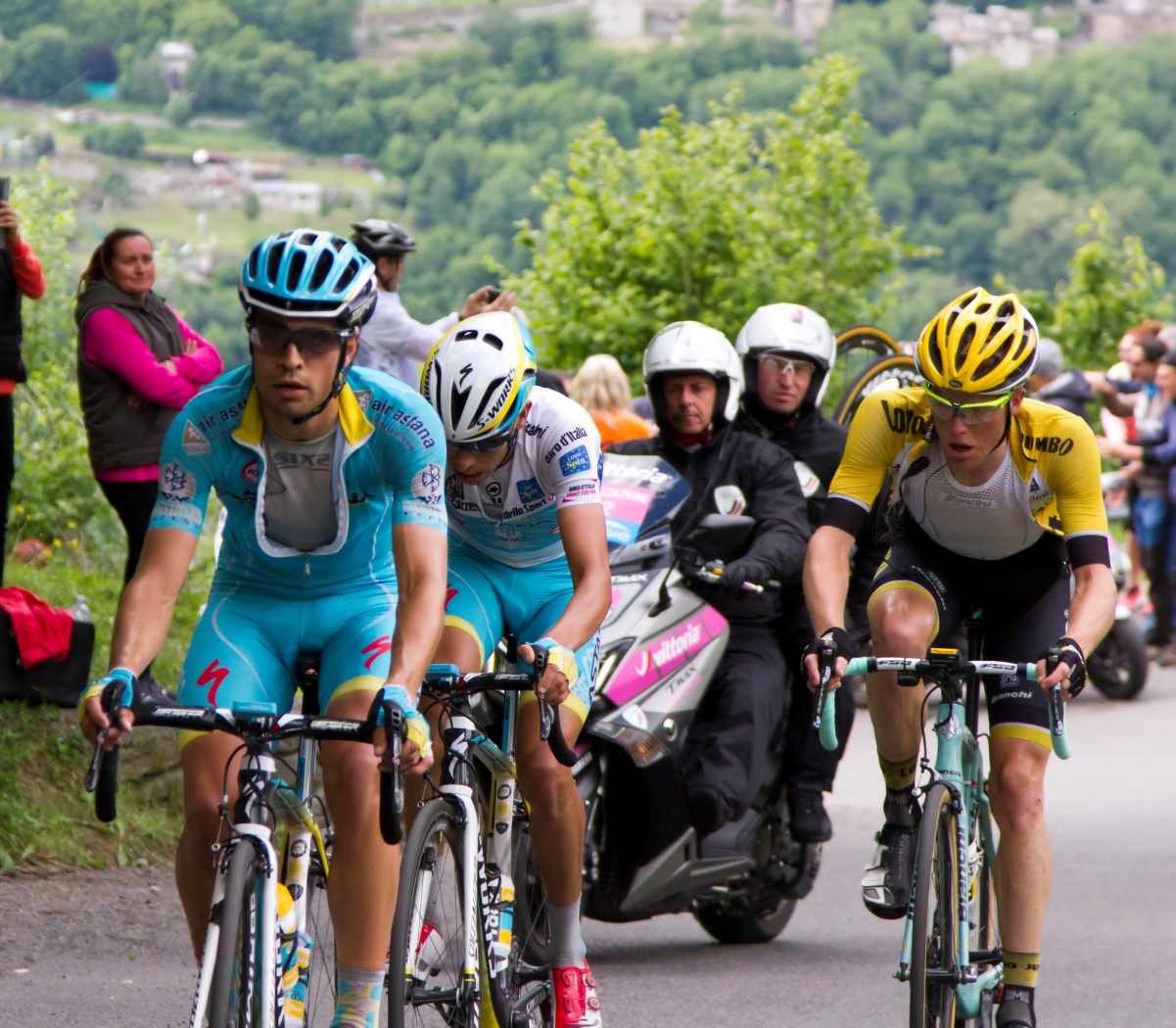 080 kopgroep aru landa kruiswijk